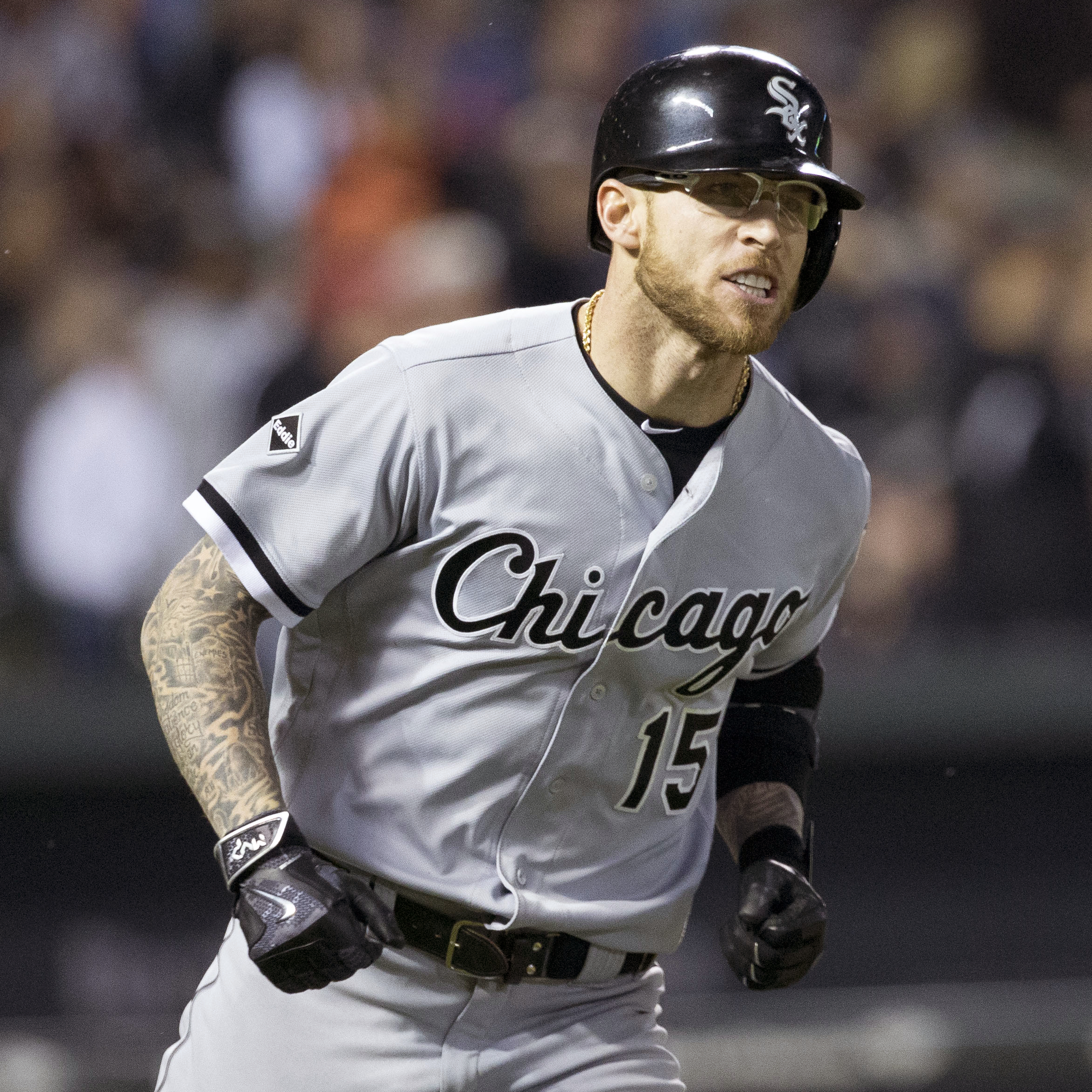 Brett Lawrie